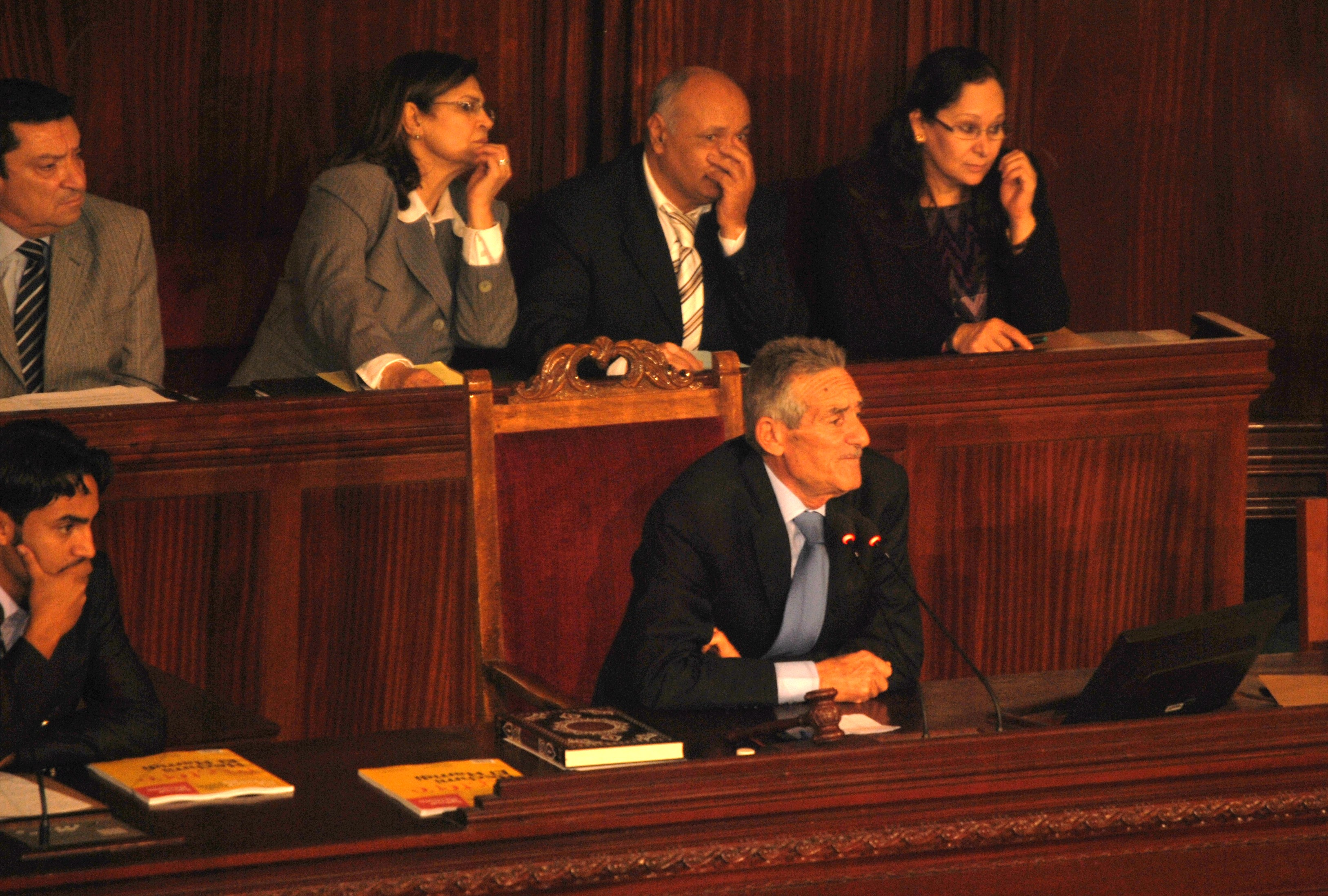 Tahar Hmila, présidant la séance d'ouverture de l'assemblée constituante tunisienne, le 22 novembre 2011